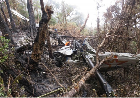 Lokasi tempat jatuhnya pesawat Aviastar. Seluruh awak dan penumpang tewas di tempat